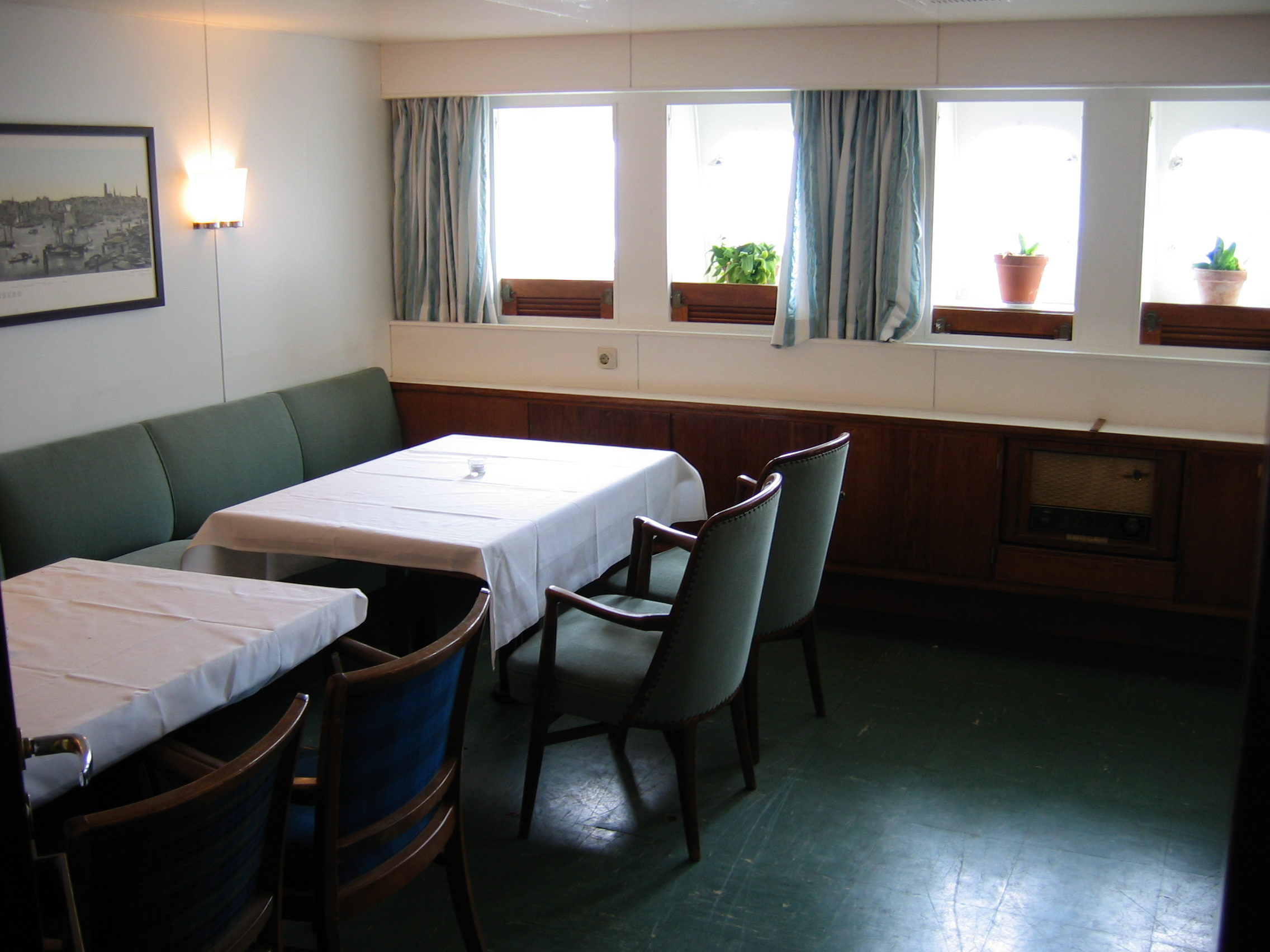 Mesa na MS Cap San Diego